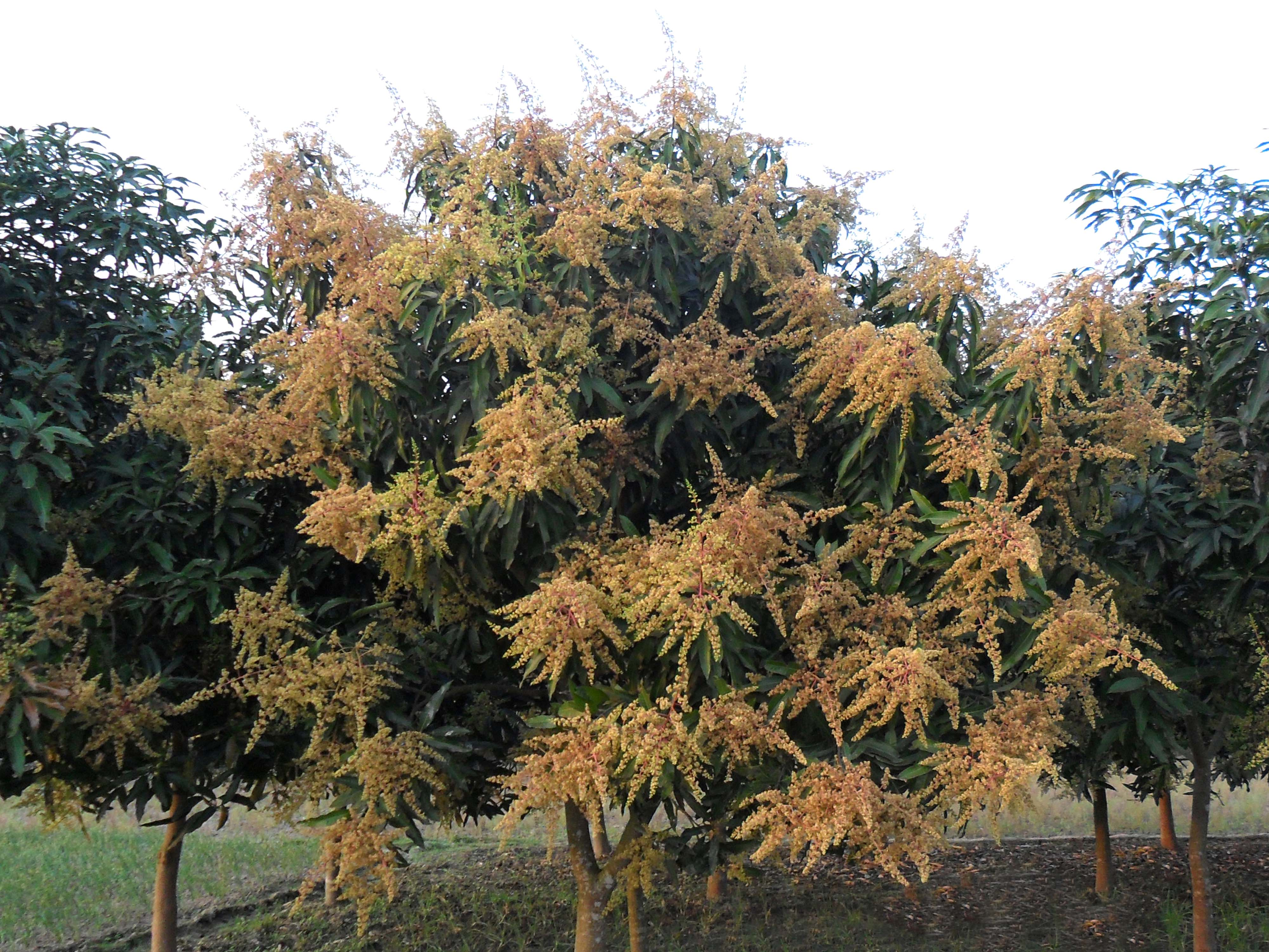 ছবিটি যশোরের মণিরামপুর থানার ব্রাহ্মণডাঙ্গা গ্রামের খলিলের আমবাগ থেকে ৬ই মার্চ ২০১২ তারিখে তোলা। বাংলাদেশ যত প্রকার ফলের চাষ হয় তার মধ্যে আম অন্যতম। আম স্বাস্থের জন্য যেমনি ভাল, তার চেয়ে আমের মুকুল মনের সুস্থতার আরো ভালো। আমের মুকুল আমের বনকে ফুলবনে পরিনত করে এবং সৃষ্টি করে নয়নাভিরাম দৃশ্যের।